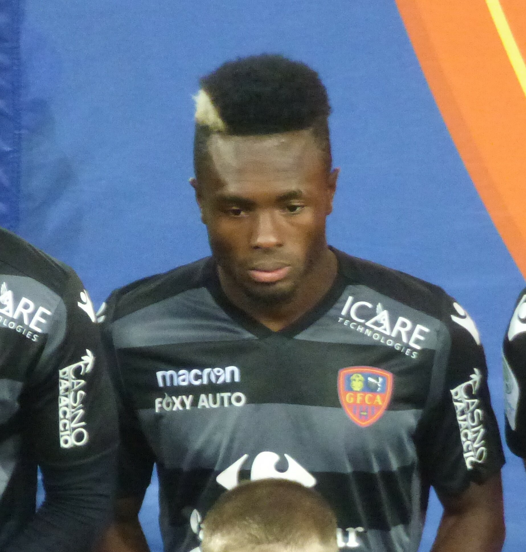 Fodé Camara avant le match RC Lens / GFC Ajaccio, comptant pour la onzième journée du championnat de France de Ligue 2 2018-2019 au Stade Bollaert-Delelis, le 22 octobre 2018.